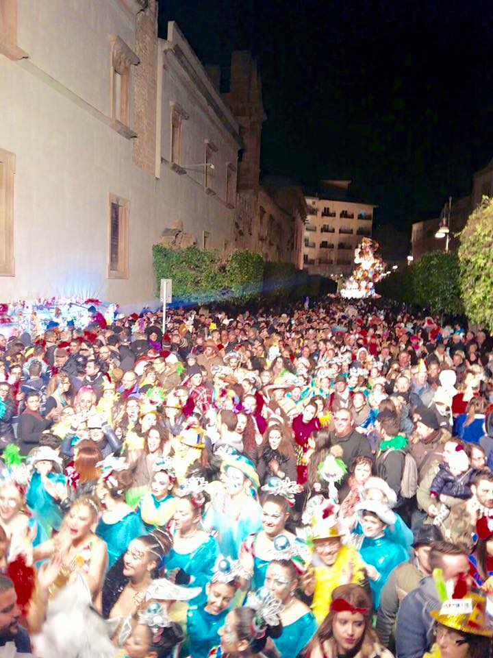 sciacca carnevale 2016 momenti